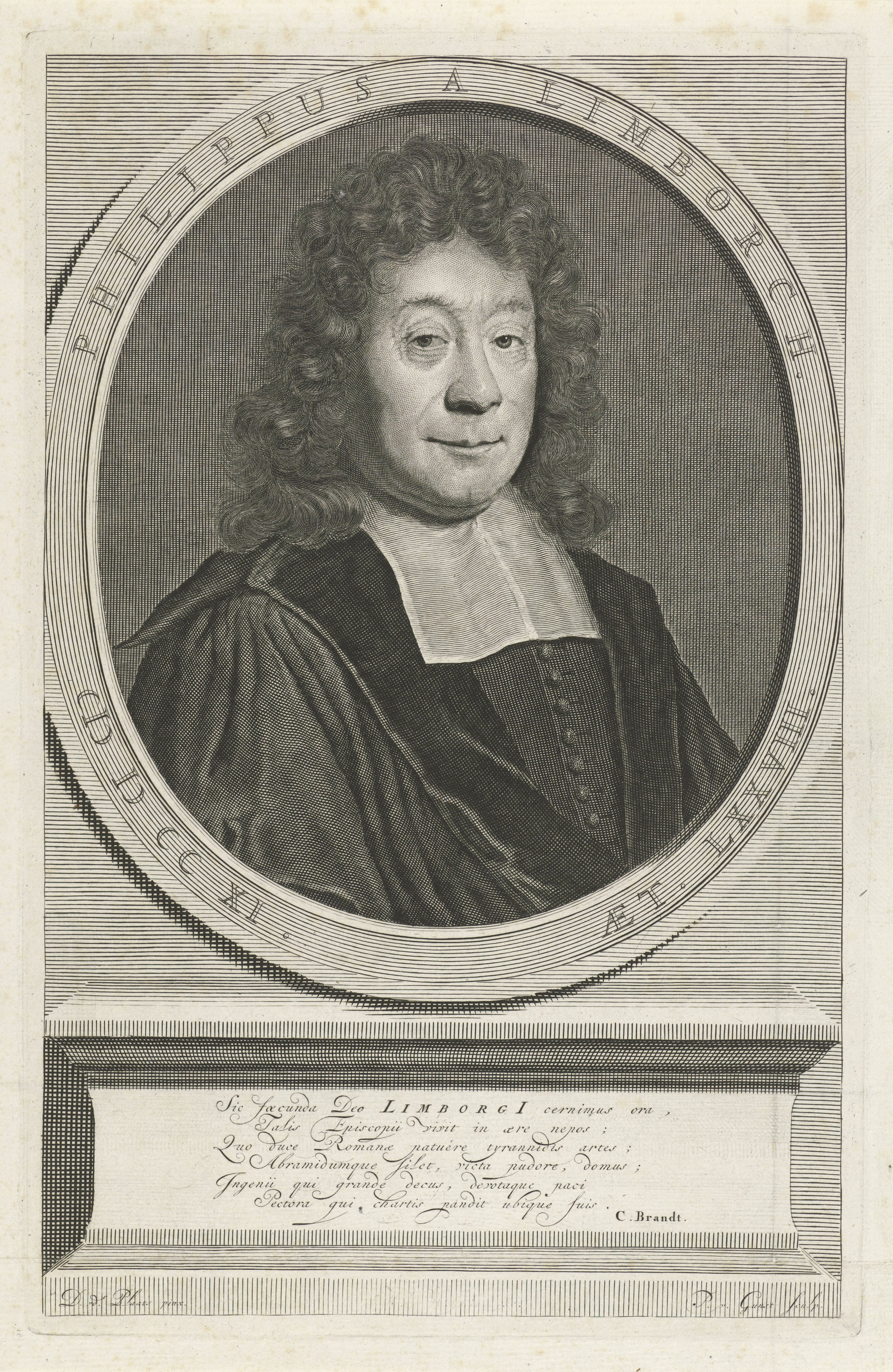 IdentificatieTitel(s): Portret van Philippus van Limborch op 78-jarige leeftijdObjecttype: prent Objectnummer: RP-P-1907-3123Catalogusreferentie: Collectie Rijksmuseum-3(3)Opmerking: 3(3) aan de hand van aanwezige staten RijksmuseumFMP 3227Opschriften / Merken: verzamelaarsmerk, verso midden onder, gestempeld: Lugt 2228Omschrijving: Philippus van Limborch op 78-jarige leeftijd. Amsterdamse predikant en hoogleraar van de remonstranten. De prent heeft een Latijns onderschrift over zijn leven.VervaardigingVervaardiger: prentmaker: Pieter van Gunst (vermeld op object)naar schilderij van: David van der Plas (vermeld op object)schrijver: C. Brandt (vermeld op object)Plaats vervaardiging: AmsterdamDatering: 1711 - 1731Fysieke kenmerken: gravureMateriaal: papier Techniek: graveren (drukprocedé)Afmetingen: plaatrand: h 275 mm × b 176 mmOnderwerpWie: Philippus van LimborchVerwerving en rechtenVerwerving: aankoop 1905Copyright: Publiek domein